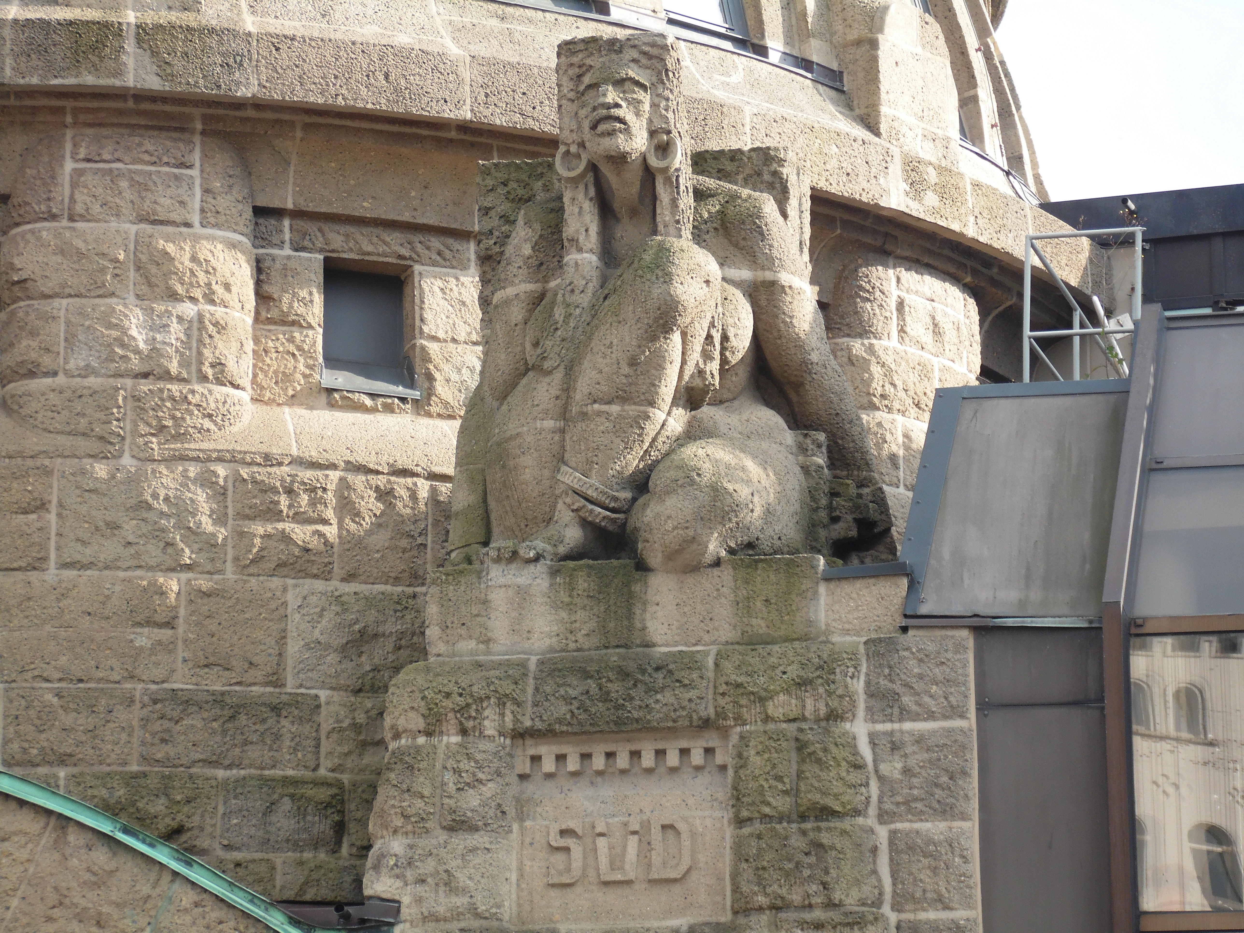 St.-Pauli-Landungsbrücken in Hamburg, allegorische Figur des Südwinds von Bildhauer Arthur Bock (1909)